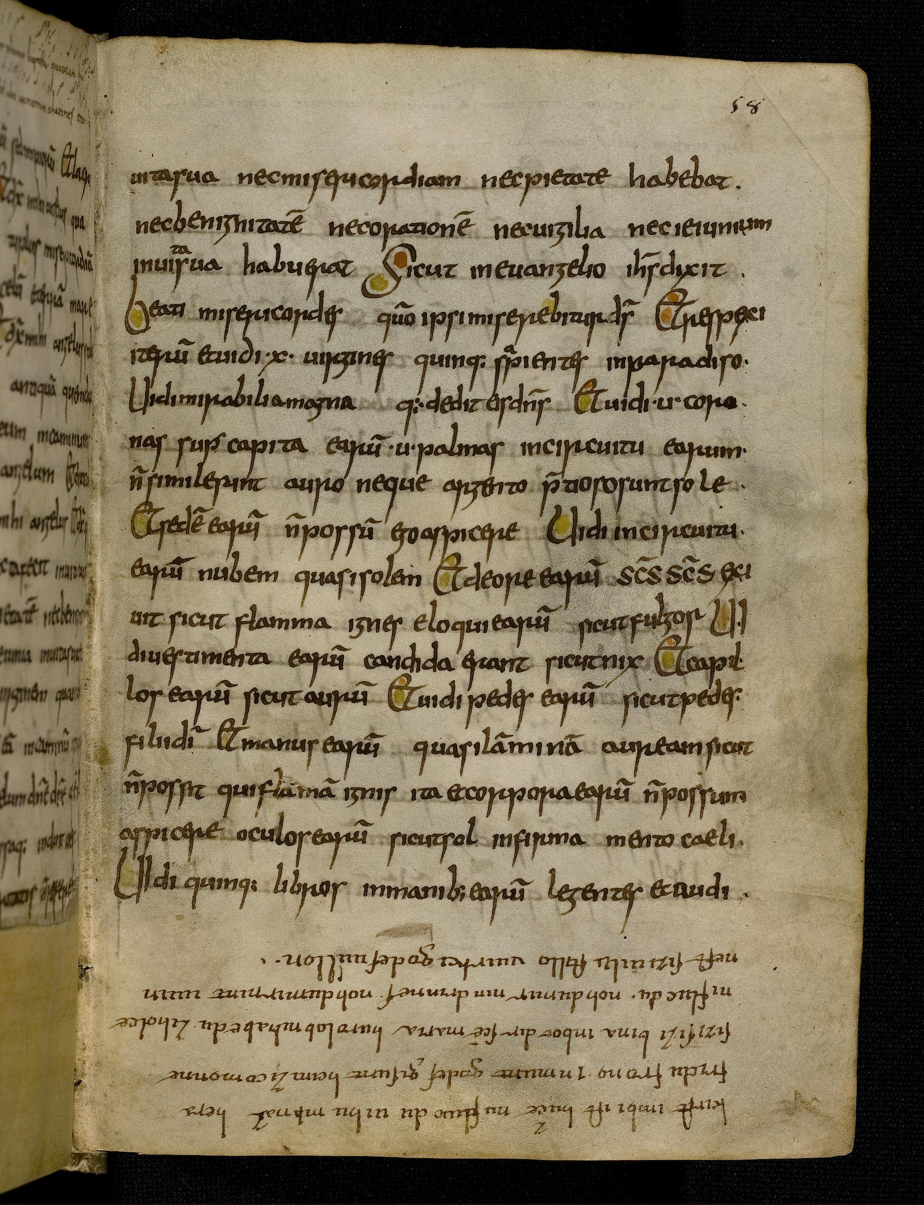 Codex Palatinus latinus 220, Fol. 58r, mit dem Lorscher Bienensegen.